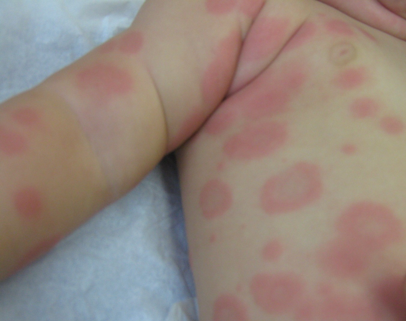 Érythème polymorphe - nourrisson, éruption cutanée, à J1, isolée, sans fièvre ni aeg, ni prurit, ni atteinte muqueuse, faite de nombreux éléments supra-centimétriques maculo-papuleux érythémateux, en cocarde, certains confluents et polycycliques, s’effaçant à la pression. Évolution spontanément résolutive en 3 jours. Origine virale probable.